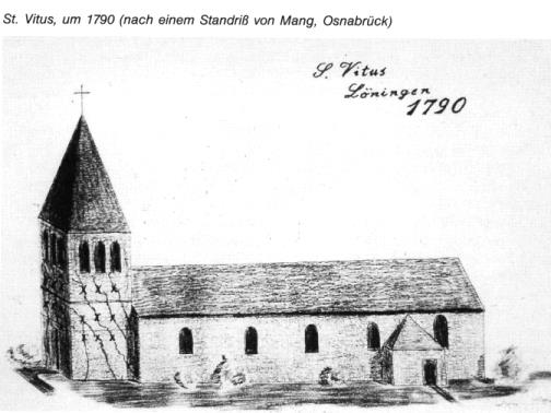 Standriss der kath. Pfarrkirche St. Vitus in Löningen von 1790